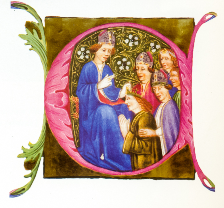 A király megkoronázása. Miniatúra II. Ulászló magyar király megkoronázáskor használt Filipec-pontifikáléból. Corvin Mátyás budai miniátor műhelyében készült a király kancellárja, Filipecz János nagyváradi püspök részére a díszes Pontificale, amelyből ez a miniatúra származik. A kódexet a Corvina-műhely vezető mestere, Felix Ragusanus (1450-1517) készítette.